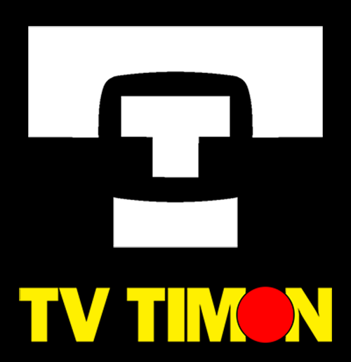 Logotipo da TV Timon, emissora de televisão brasileira sediada em Timon - MA, utilizado de 1985 a 1995.